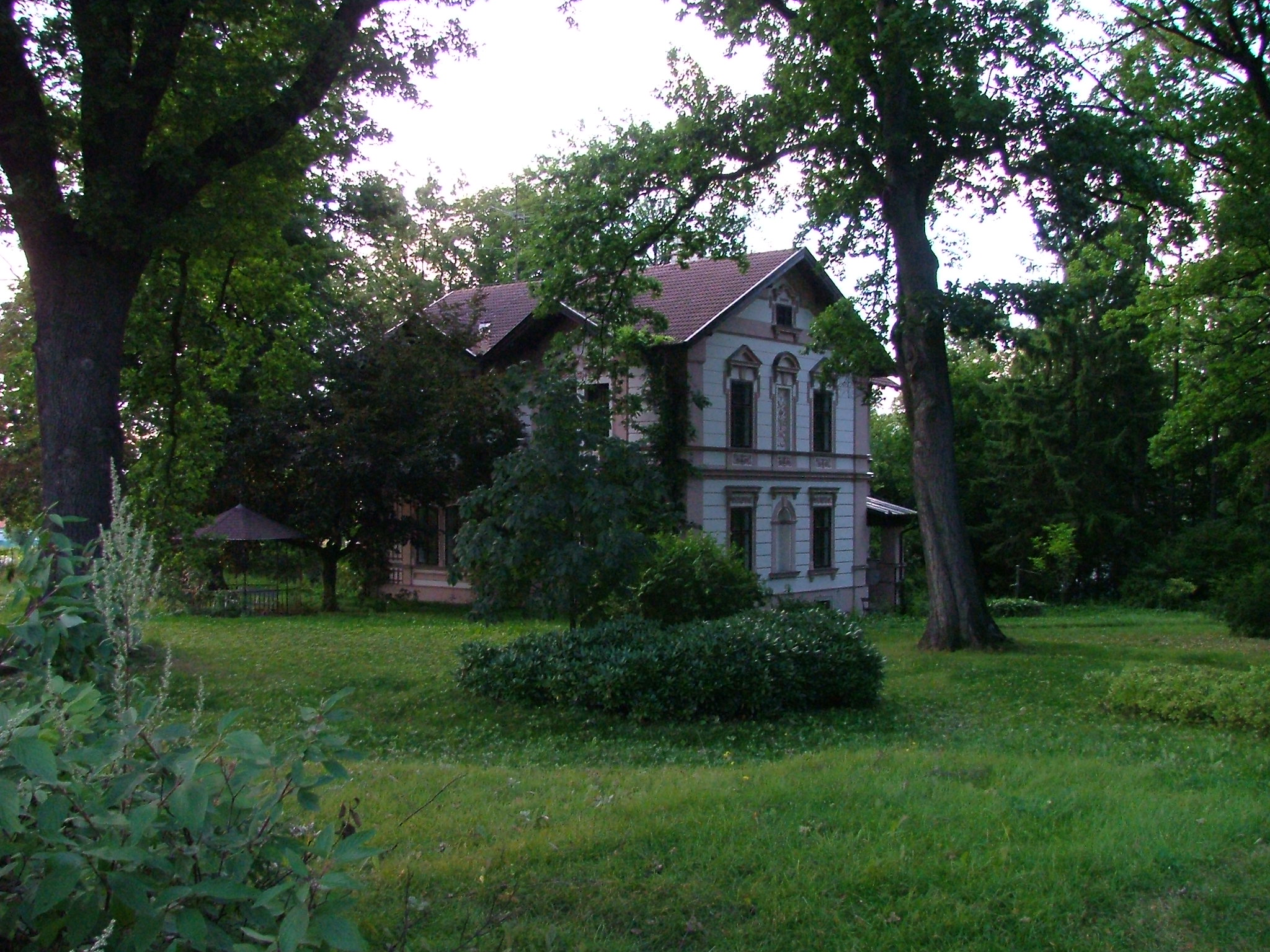 Vila, kterou si dr. August Zátka nechal postavit v Libníči u Českých Budějovic (čp. 48?).